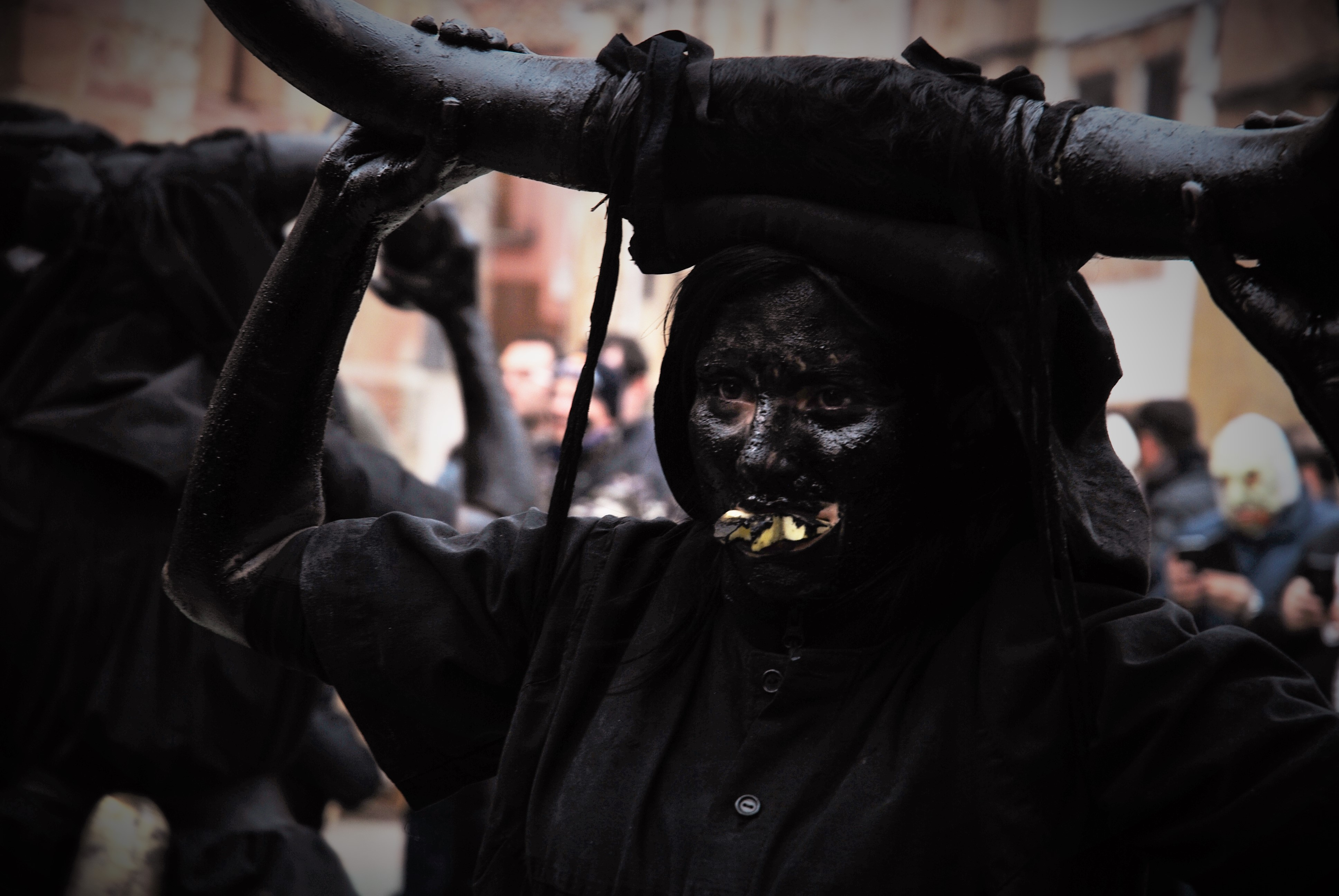 carnaval luzon